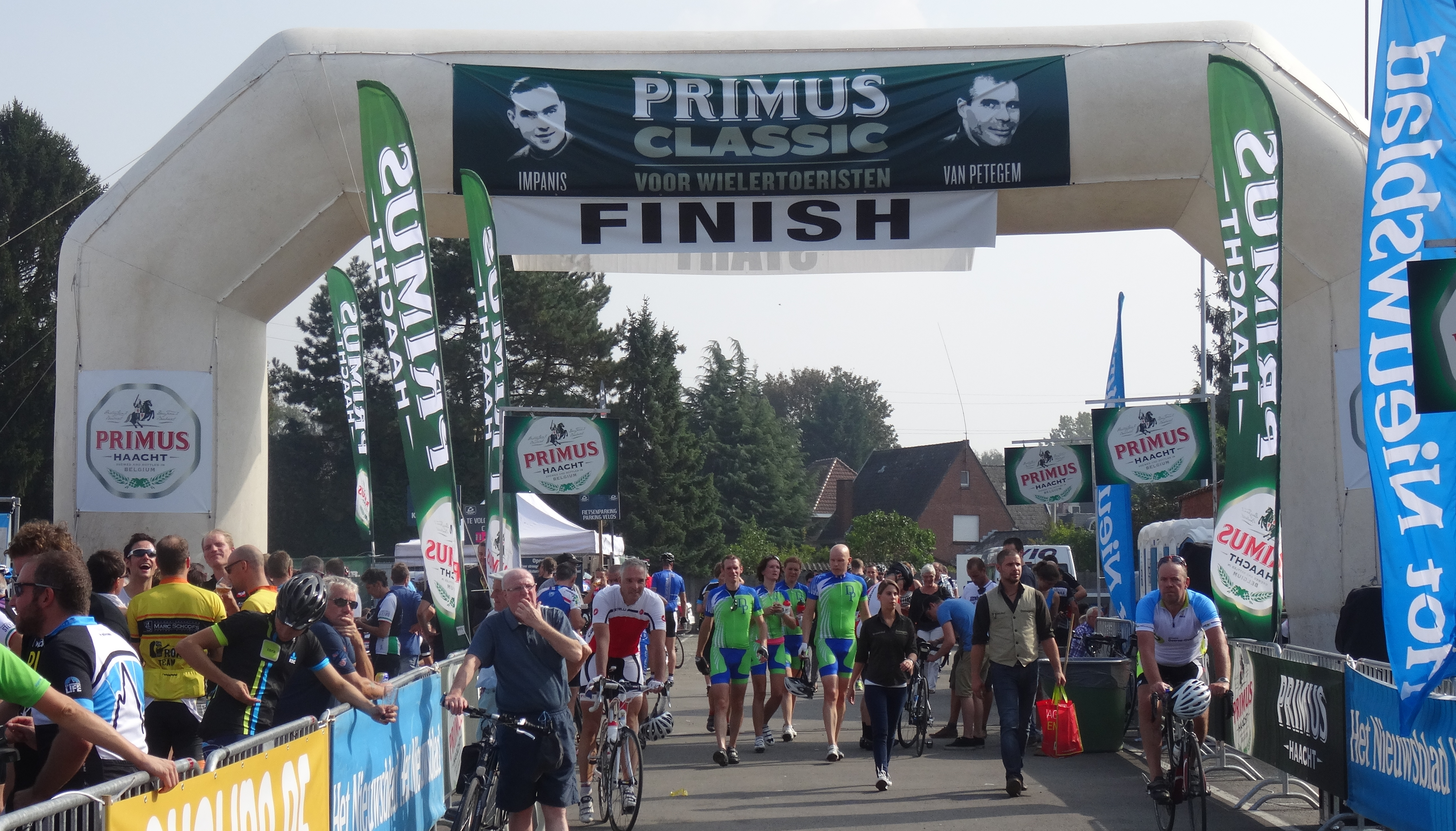 Grand Prix Impanis-Van Petegem 2014.